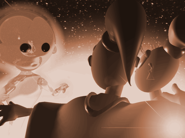 Capture d'écran du jeu vidéo Little Big Adventure (1994), développé par Adeline Software International.